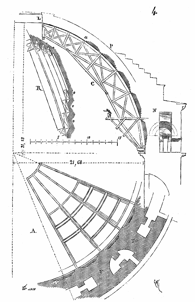 ... Quand les Romains construisaient un arc-doubleau, Pour expliquer clairement la méthode des constructeurs romains lorsqu'ils voulaient fermer de grandes coupoles, nous prenons comme type le Panthéon de Rome. La figure 4 présente une section de cette voûte hémisphérique. Le mur de précinction, avec ses chambres de décharge si habilement combinées, a été élevé jusqu'au niveau N avec le commencement de la voûte, divisée par vingt-huit caissons dans son pourtour et qui laissaient entre eux vingt-huit bandes pleines comme autant de côtes qui se perdent dans la partie unie de la calotte comprise entre le point a et la lunette L. Ces vingt-huit bandes indiquent la place des cintres de charpente C aboutissant à une lanterne de charpente composée de vingt-huit poteaux et de deux fortes enrayures. Nous supposons ces cintres faits de bois courts et suivant la méthode des charpentes romaines reproduites sur les bas-reliefs de la colonne Trajane. Il n'y avait pas à songer, à moins de dépenses prodigieuses, à poser des cintres portant de fond, avec entraits ...